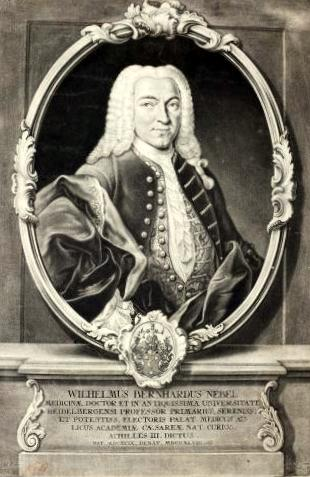 Porträt von Wilhelm Bernhard Nebel, Mediziner und Rektor der Universität Heidelberg